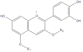 Scienceshow/Vejledninger/Rødkålsindikatoren.